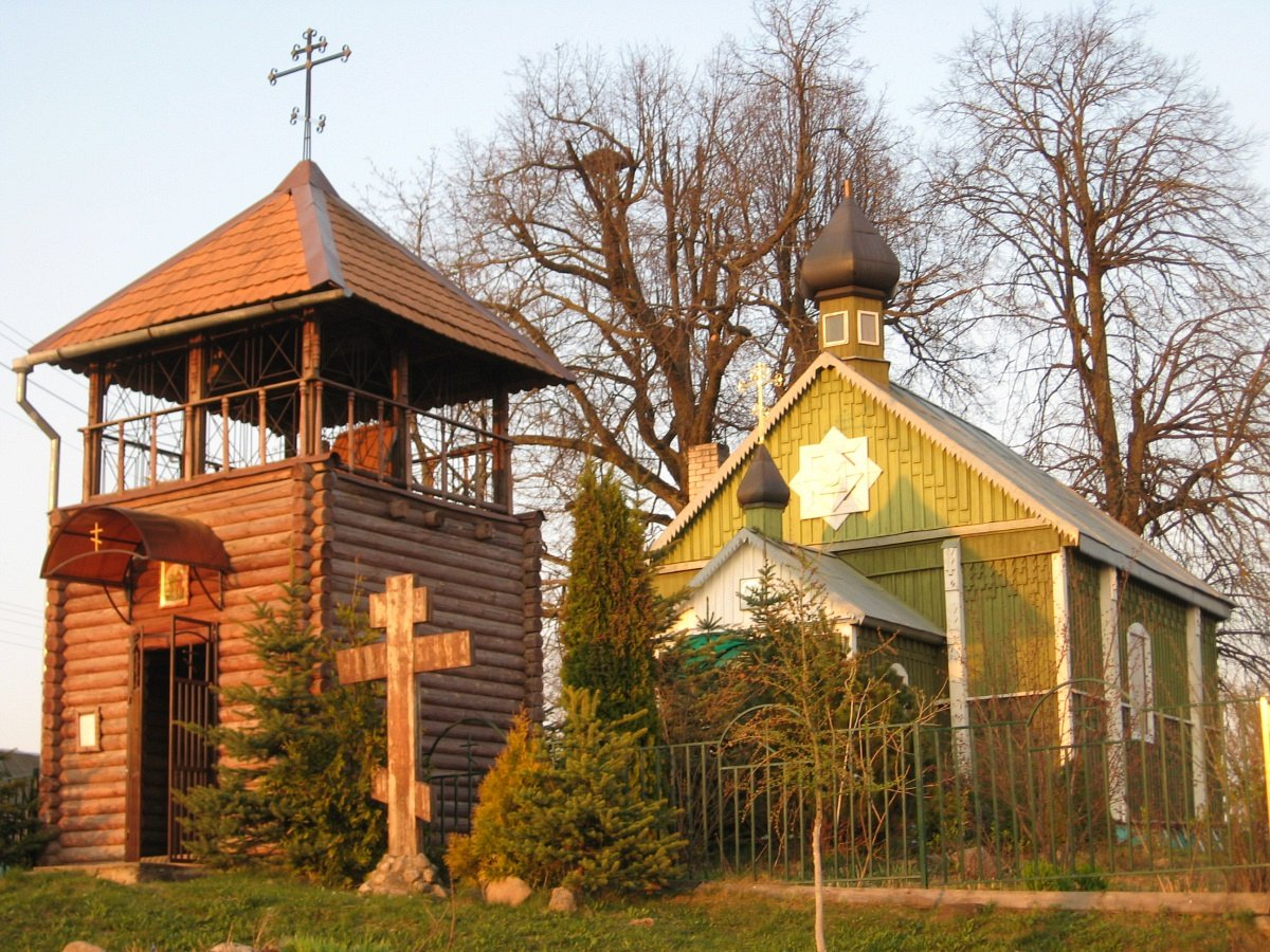 Жукаўка. Царква